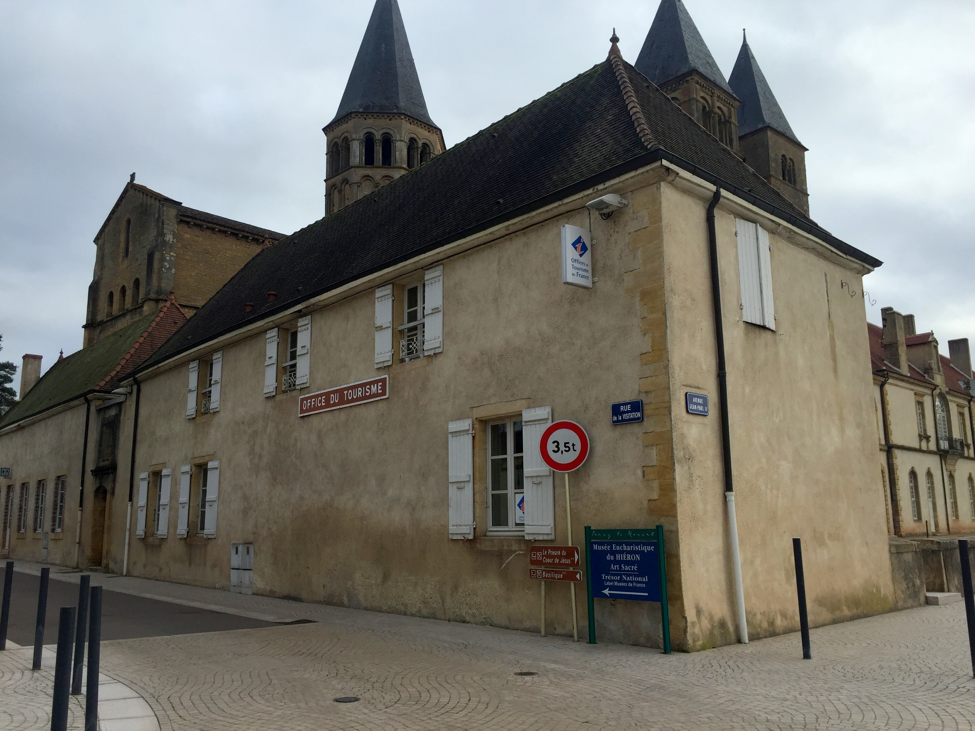 Image de Paray-le-Monial, Saône-et-Loire, France.